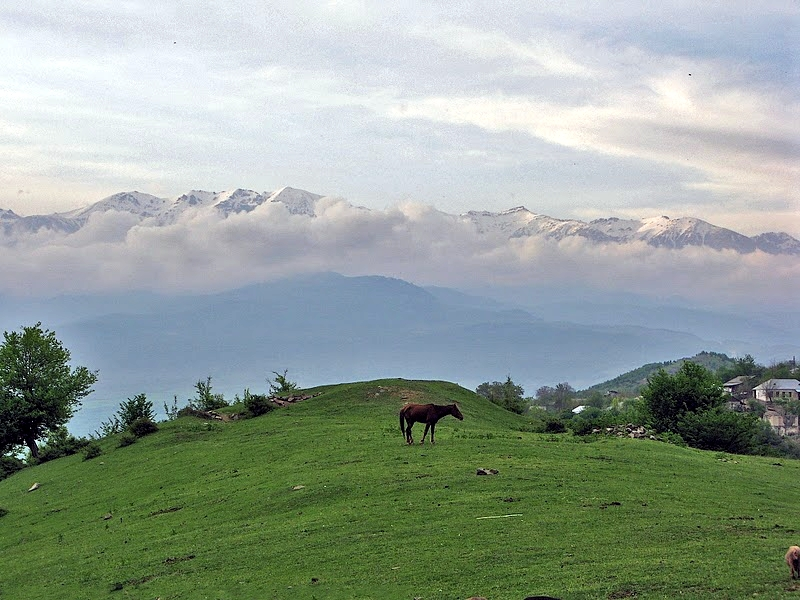 Вагуас